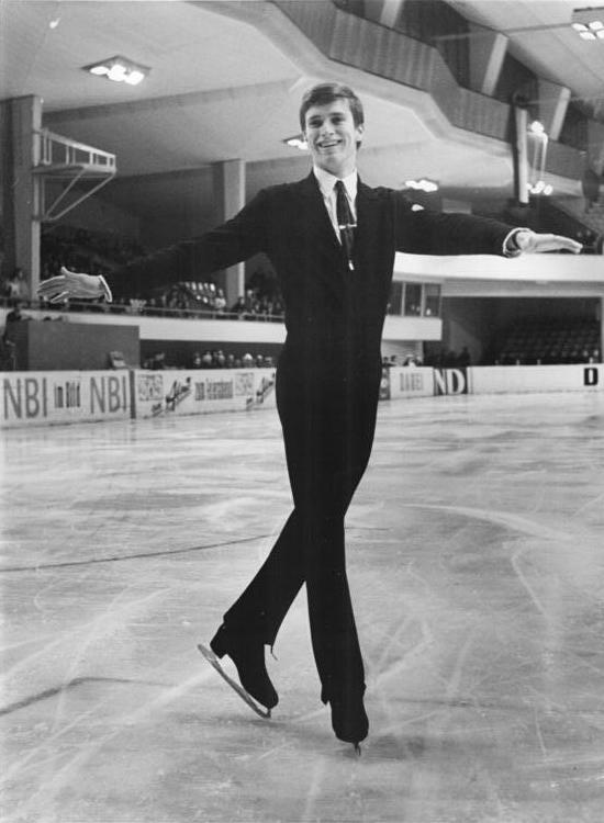 Günter Zöller ADN-ZB Wendorf-9.11.1971 Karl-Marx-Stadt: Günter Zöller: Unsere Stimme den Kandidaten der Nationalen Front.- Der Bronzemedaillengewinner der Welt- und Europameisterschaften 1970 im Eiskunstlaufen, Günter Zöller (Foto von einem früheren Wettkampf), ist zum Sekretär der FDJ-Grundorganisation der Sektion Eiskunstlaufen des SC Karl-Marx-Stadt gewählt worden. Der mehrfache DDR-Meister sprach auf der Wahlversammlung im Namen aller Sportler des SCK der Partei der Arbeiterklasse und der Regierung den Dank für die großzügige Unterstützung aus. "Deshalb gehört zu den Volkswahlen auch unsere Stimme und unser Herz den Kandidaten der Nationalen Front. Sie garantieren uns allseitige Bildungsmöglichkeiten im Sport, in der Schule und im Beruf".